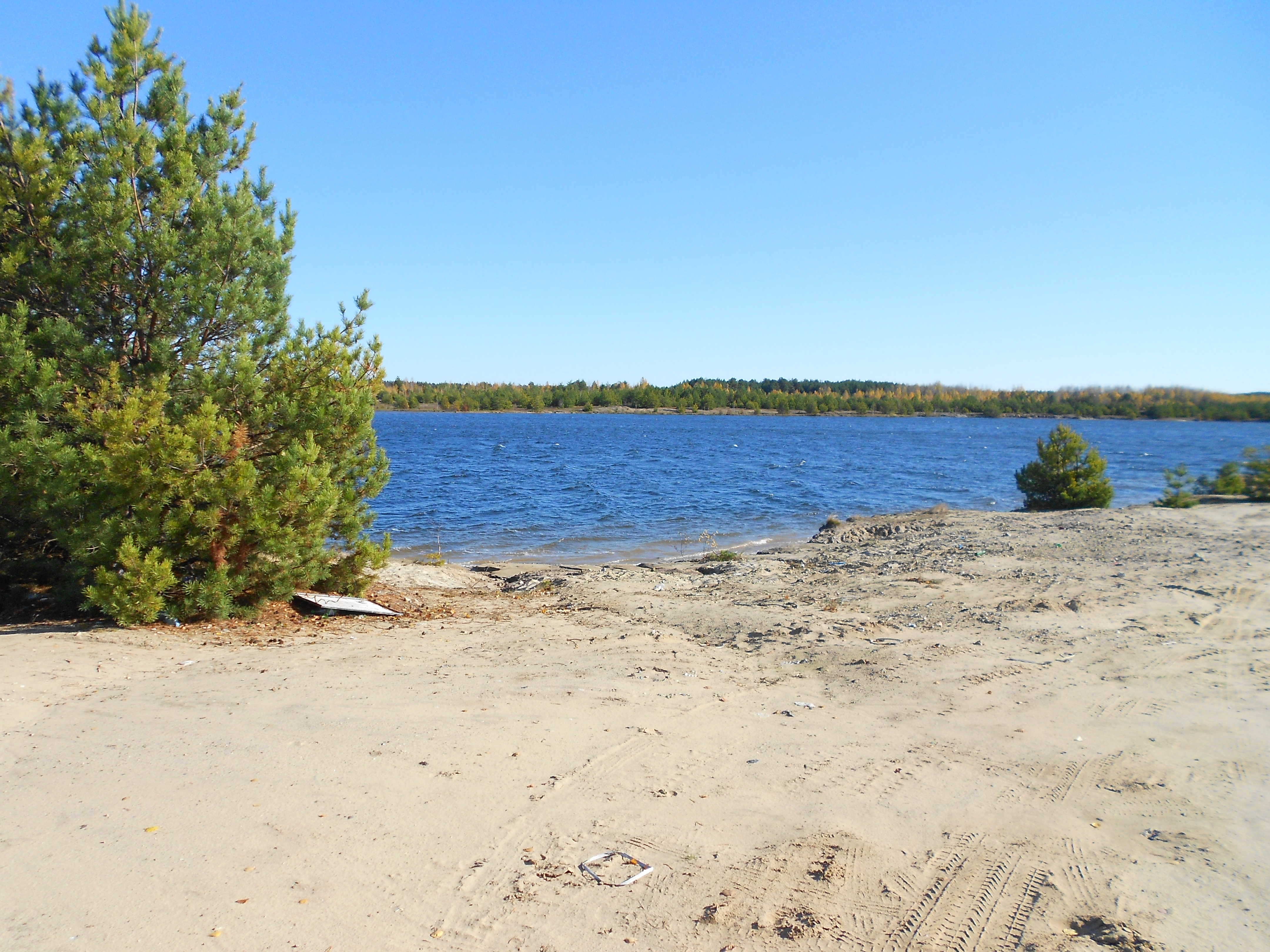 Друга Вікіекспедиція до Коростенського району. Голубі озера біля с. Лісівщина, Коростенського району.